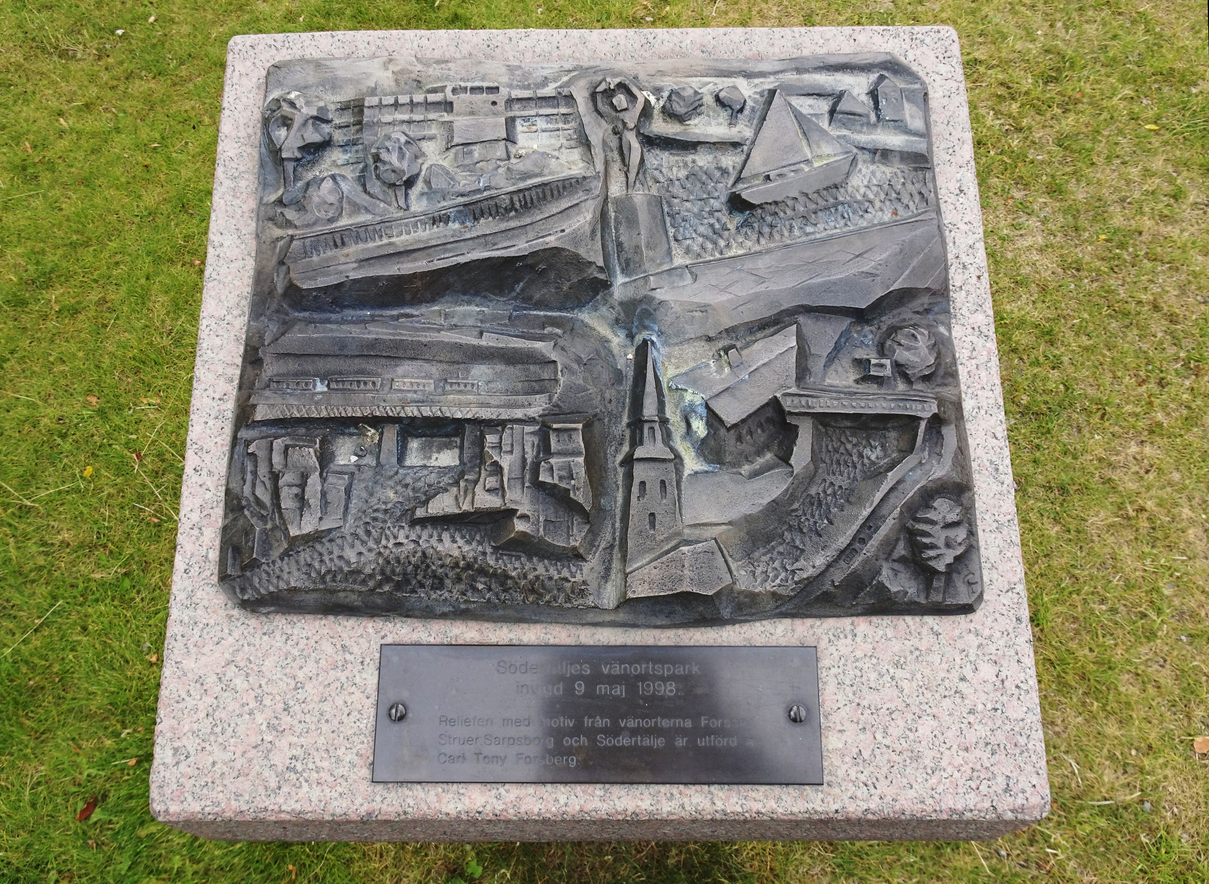 Vänortsparken, Södertälje, skulptur av Carl Tony Forsberg